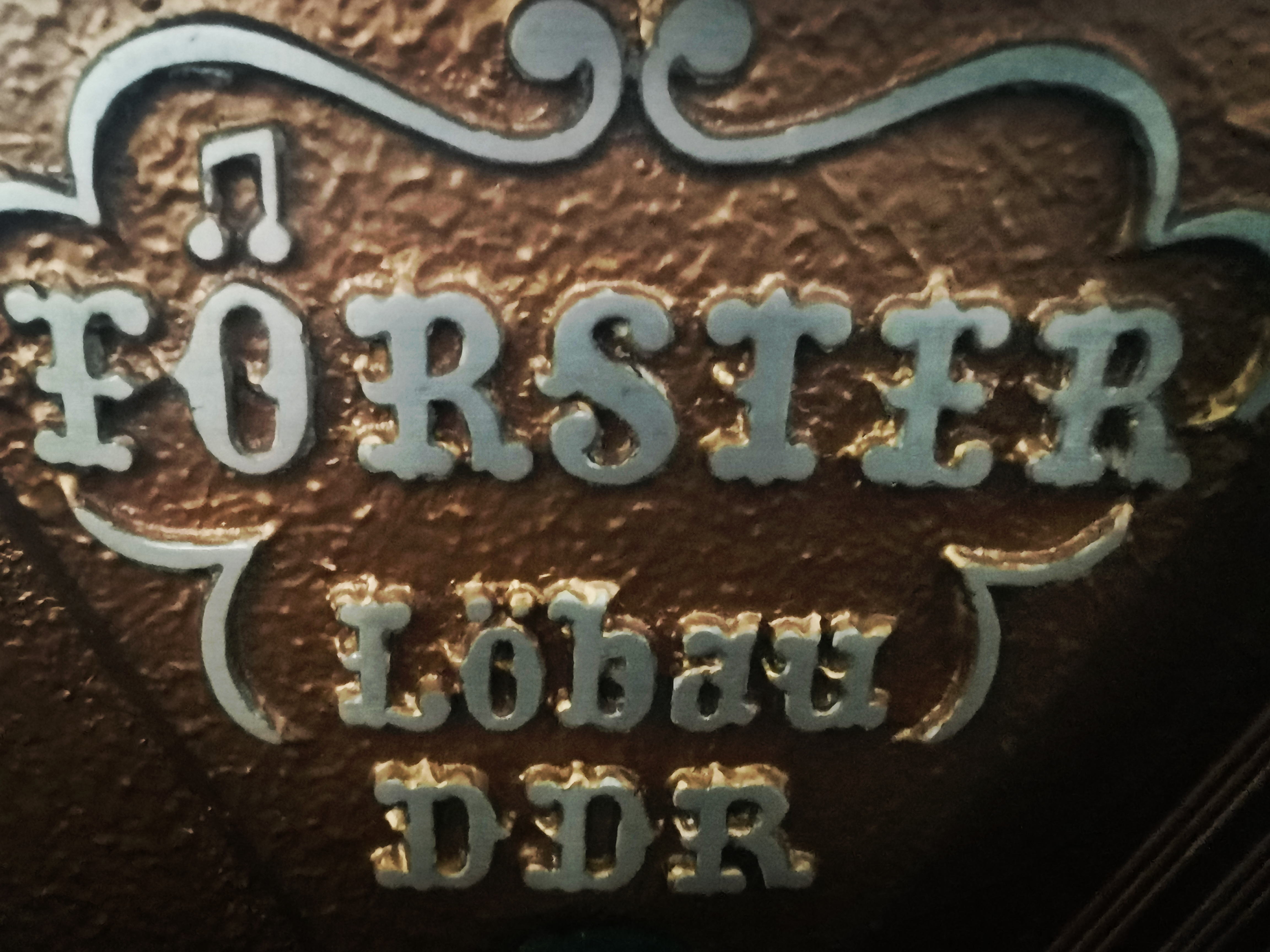 Schriftzug der Klavierbaufabrik August Förster, 1960er Jahre